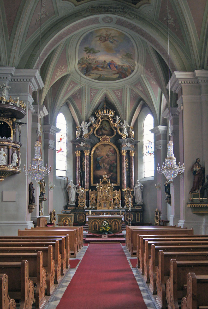 Pfarrkirche Vomp, Triumphpforte und Volksaltar